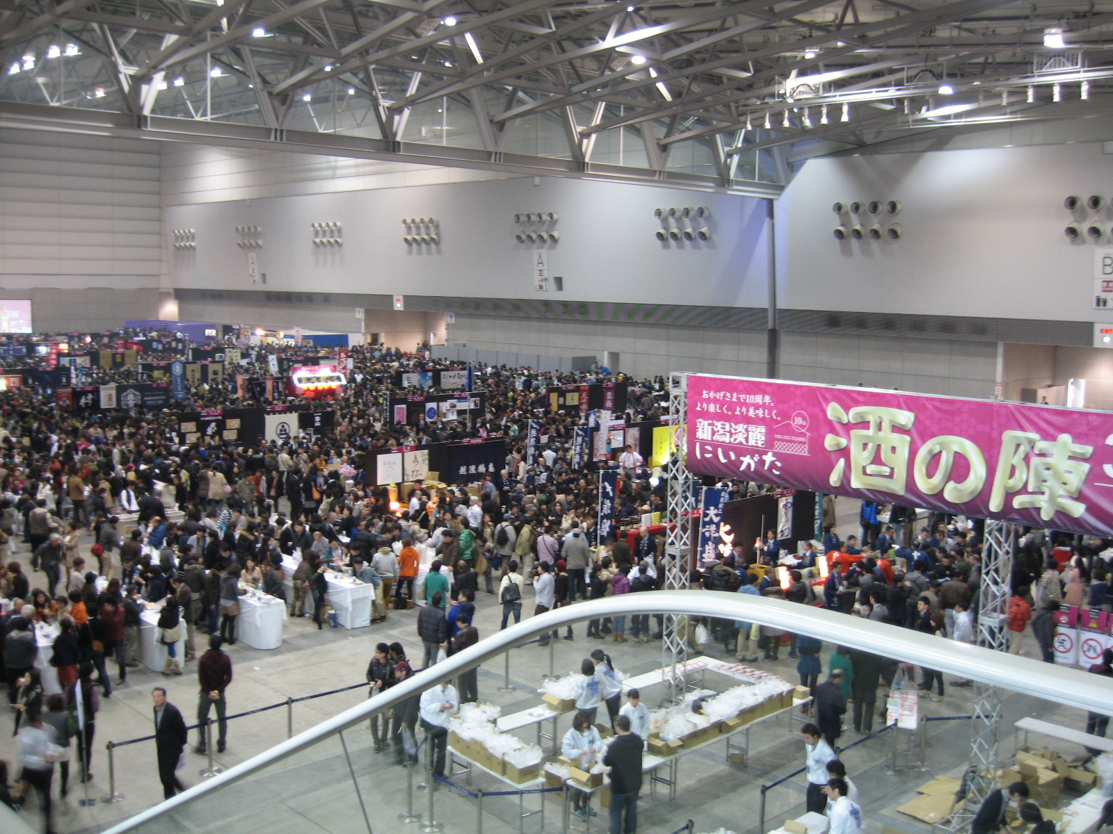 酒の陣、会場の様子。